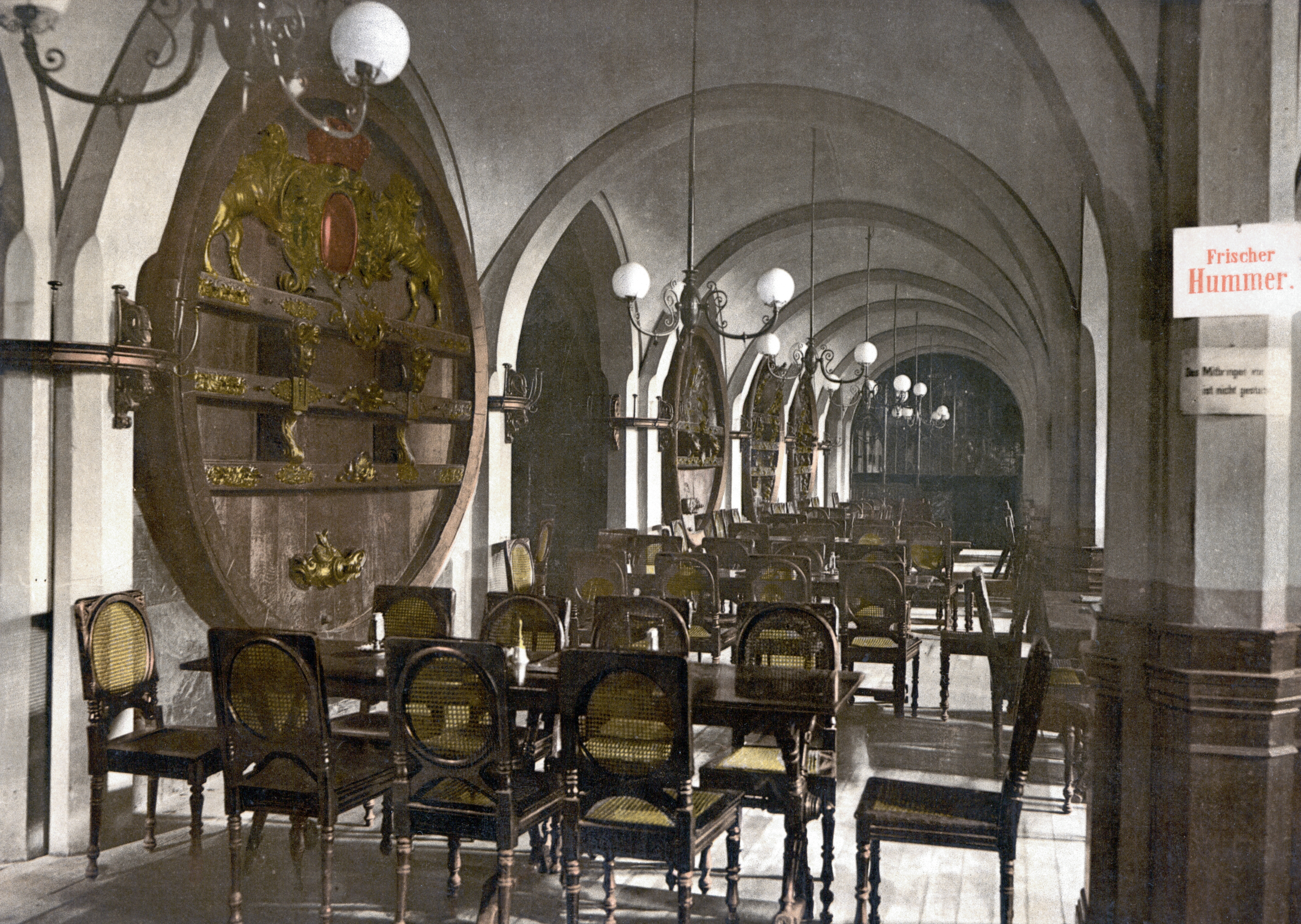 Bremen Ratskeller zwischen 1890 und 1900